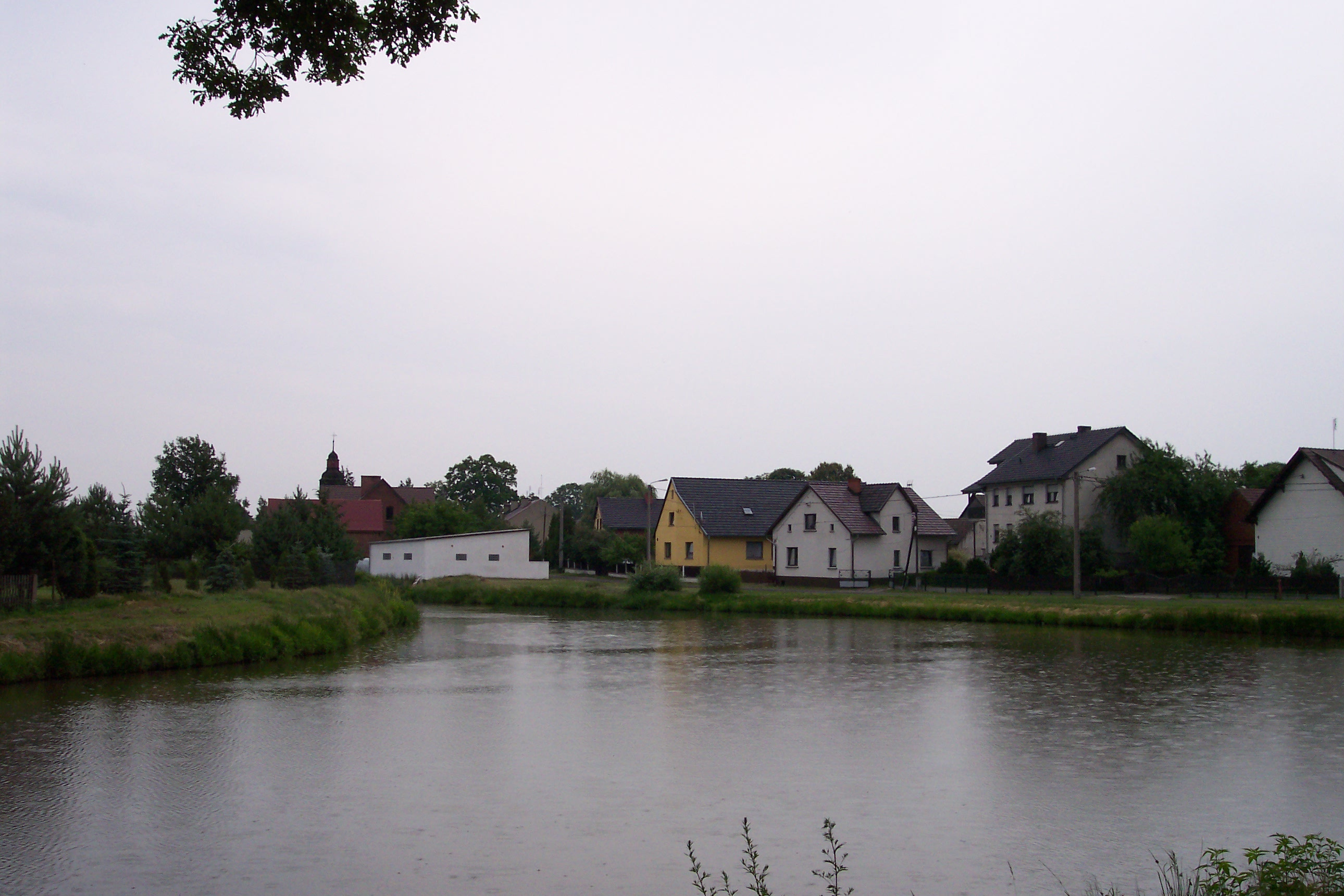 Staw w centrum Radawia